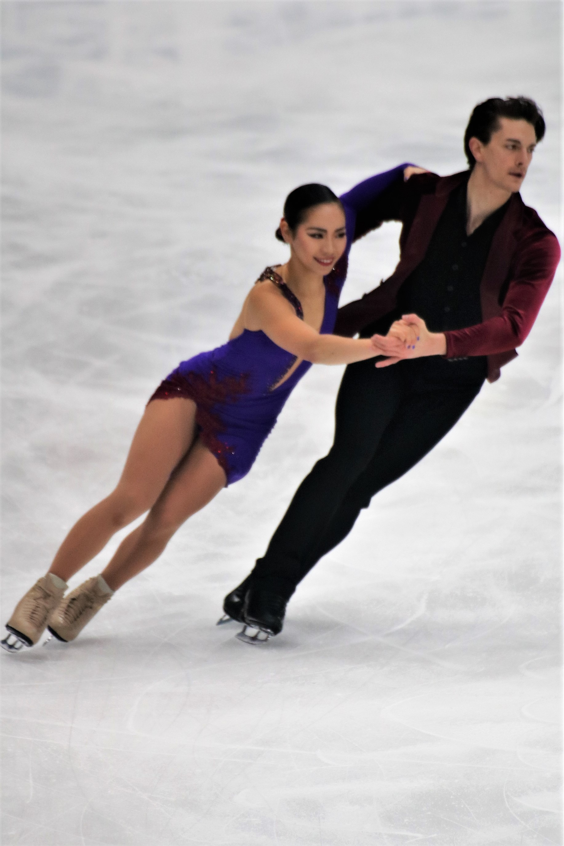 Мисато Комацубара / Тим Колето (Япония) на Rostelecom Cup 2018